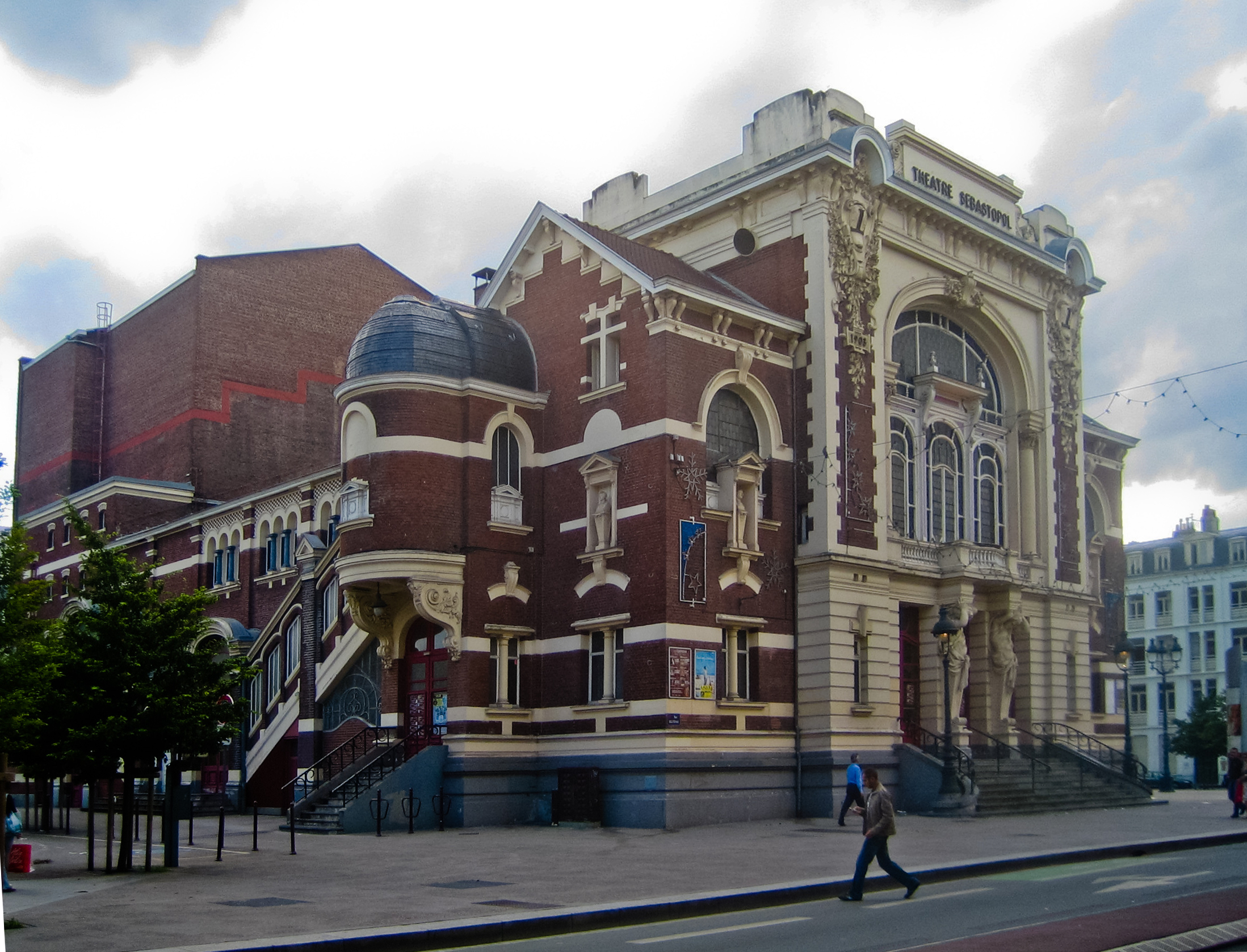 Théâtre Sébastopol, vu de côté, à Lille (Nord, France).